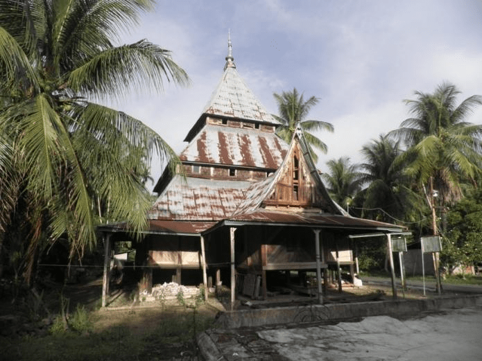 Surau Bintungan Tinggi